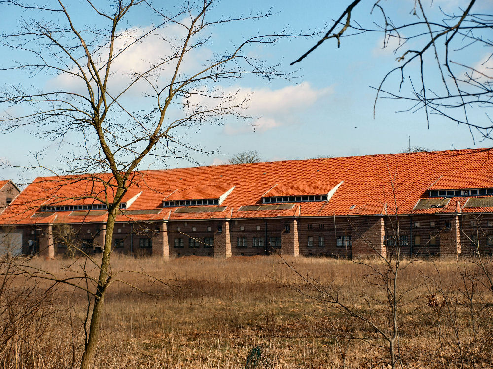 Gut Klausheide in Klausheide bei Nordhorn